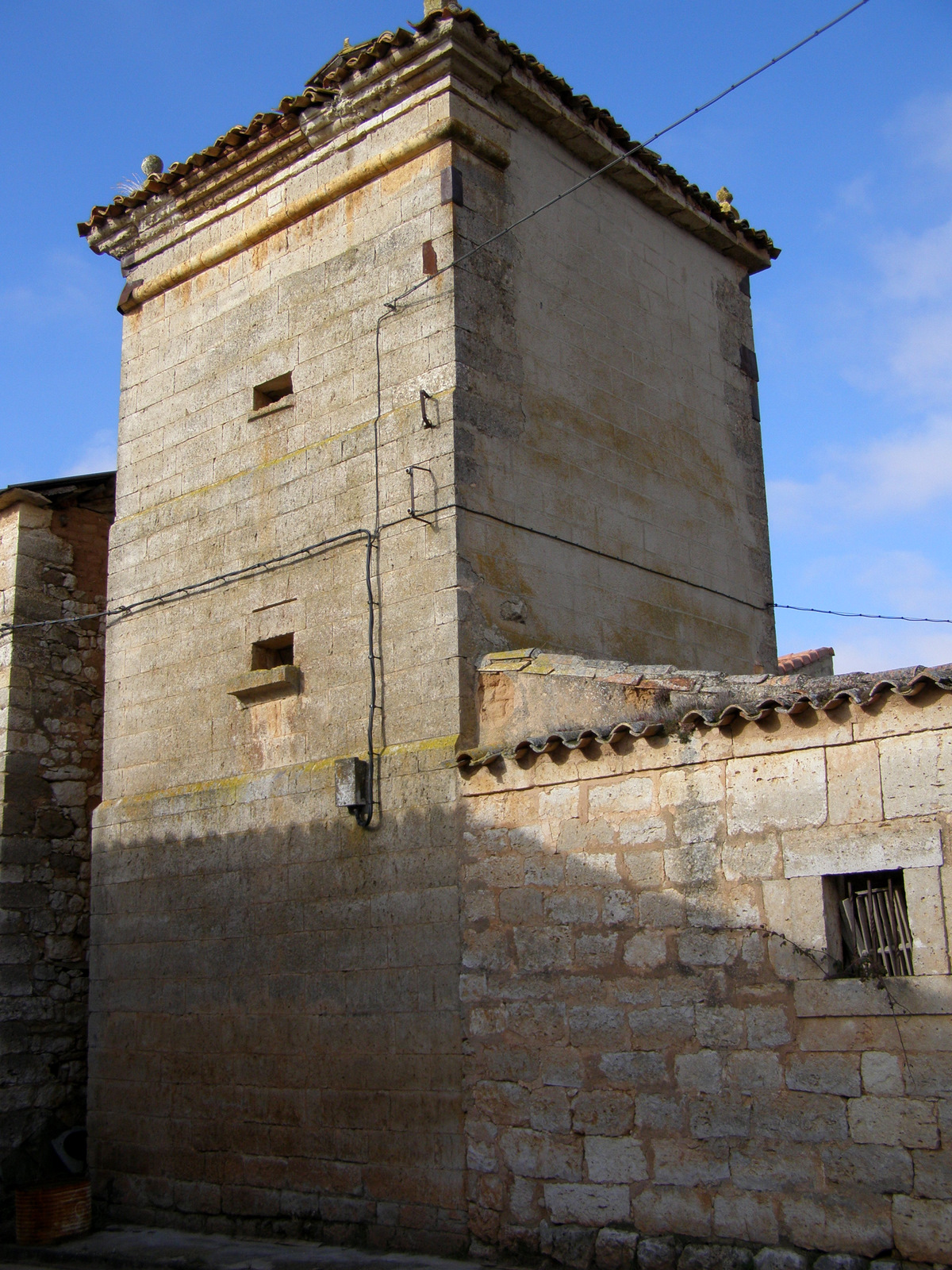 Torre de piedra en Arenillas de Villadiego